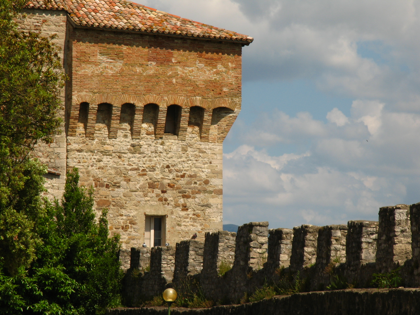 Todi, Umbria, ItaliaTodi